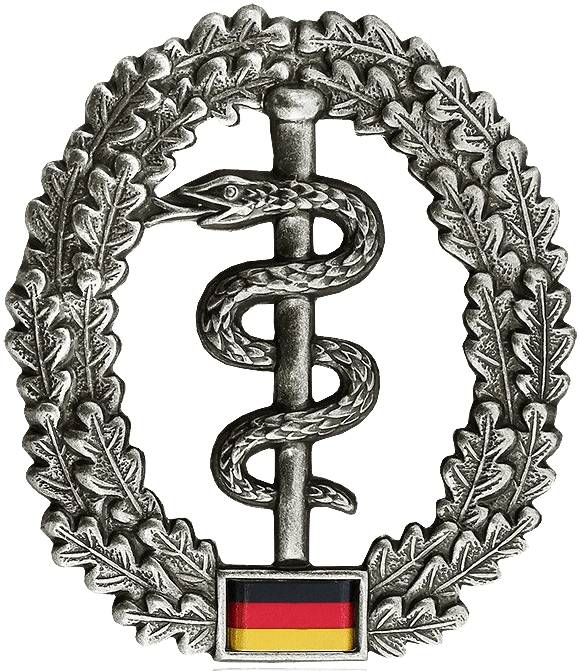 Barettabzeichen der Sanitätstruppe der Bundeswehr Barettfarbe: Kobaltblau Maße: Hoch: 53mm Breit: 46mm Ausführung: altsilber, Metall